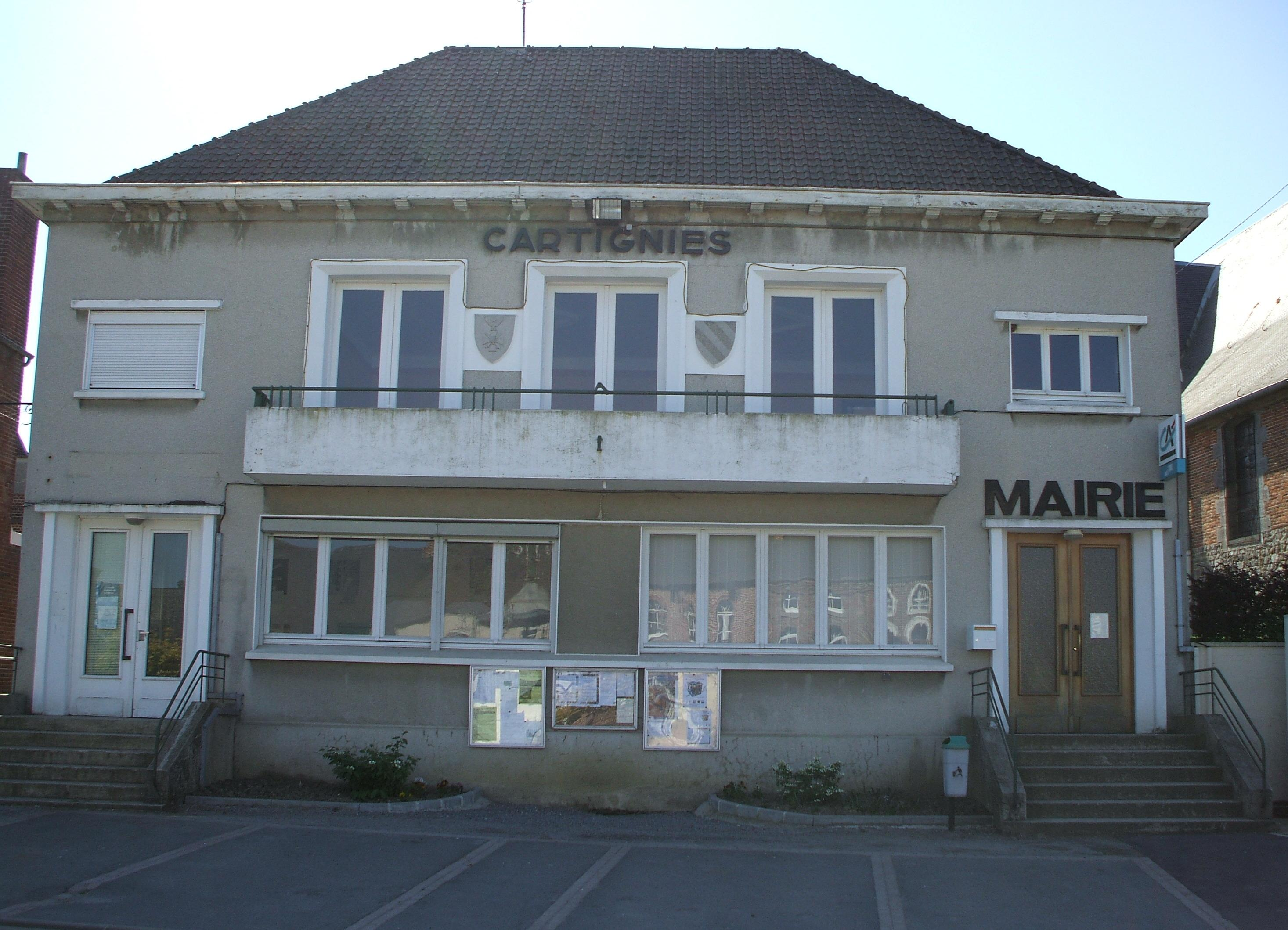 Mairie de Cartignies Nord France